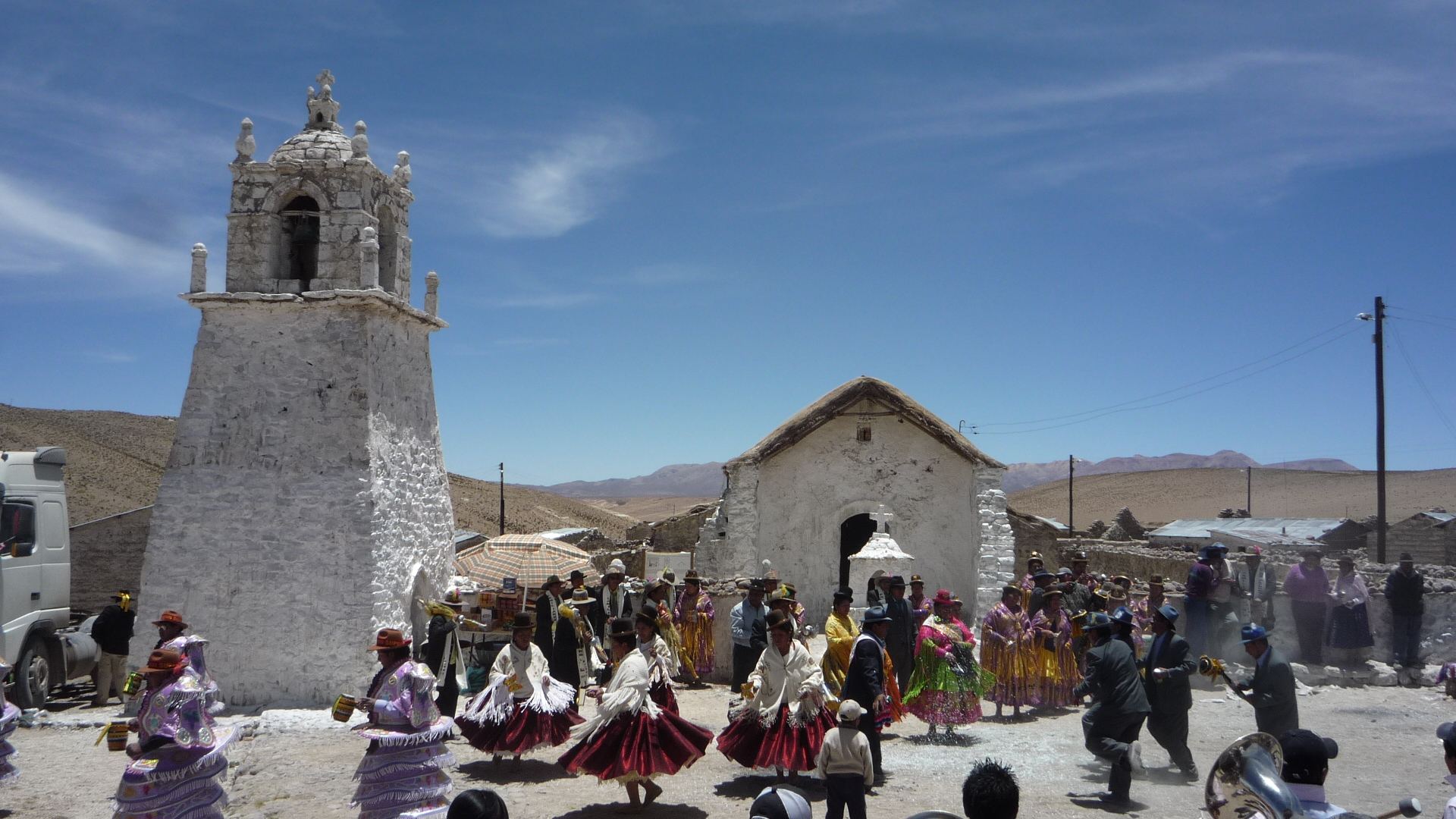 Iglesia de la Virgen de la Inmaculada Concepción de Guallatire This is a photo of a national monument in Chile: 2232